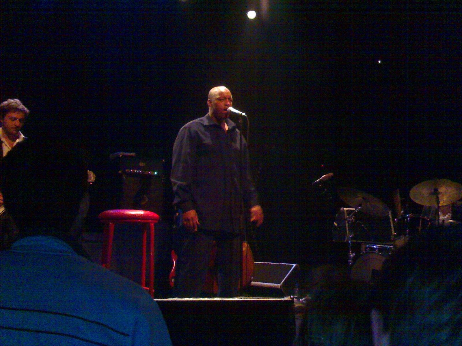 Oxmo en concert